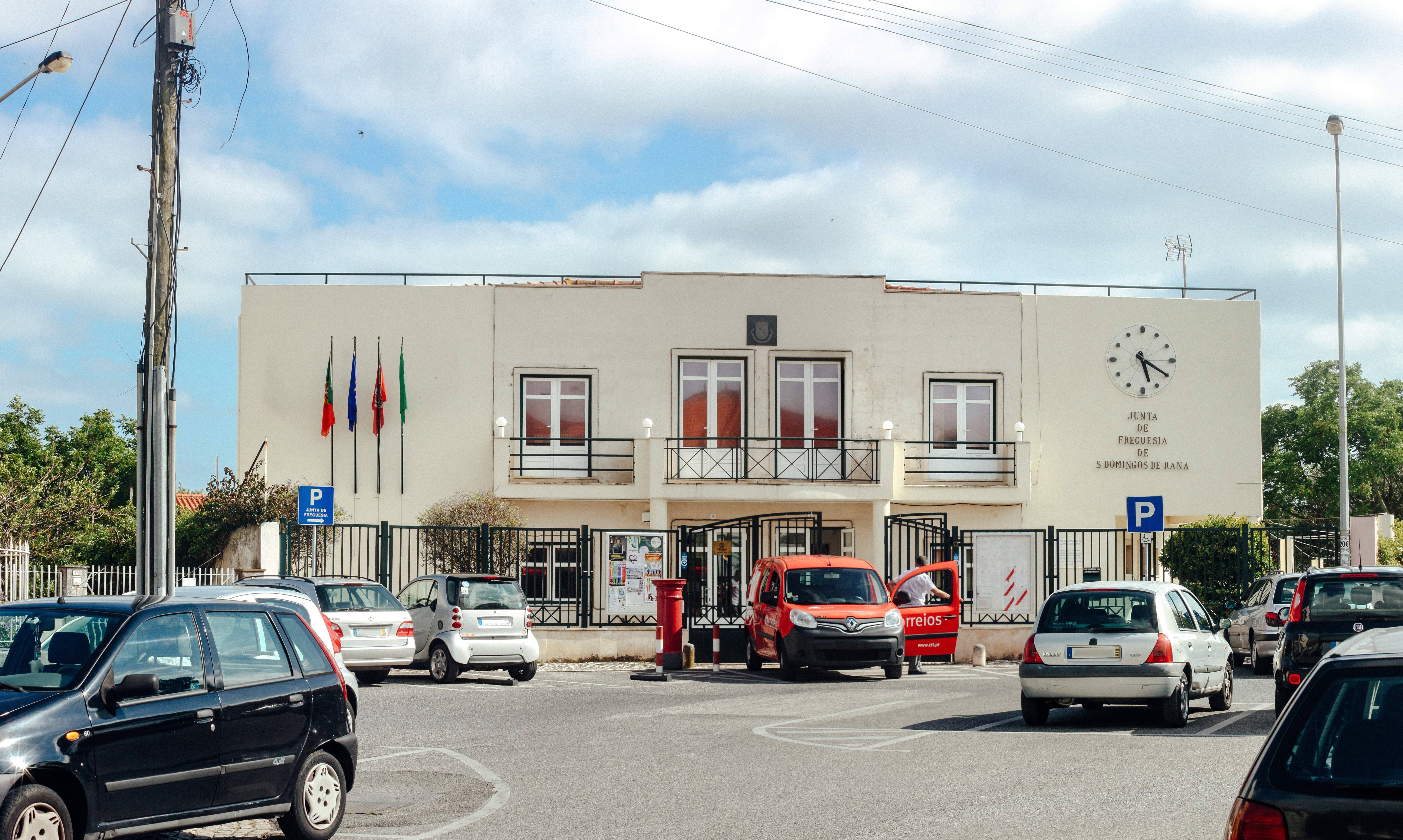 Edifício sede da Junta de Freguesia.